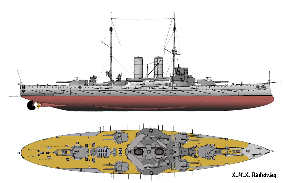 SMS Radetzky (my drawing)